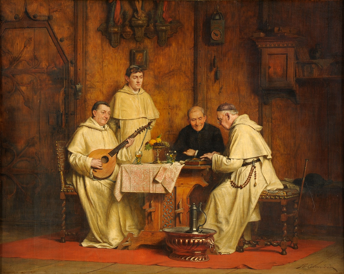 Mönche bei Tisch, einer eine Laute, ein anderer eine Zither spielend.